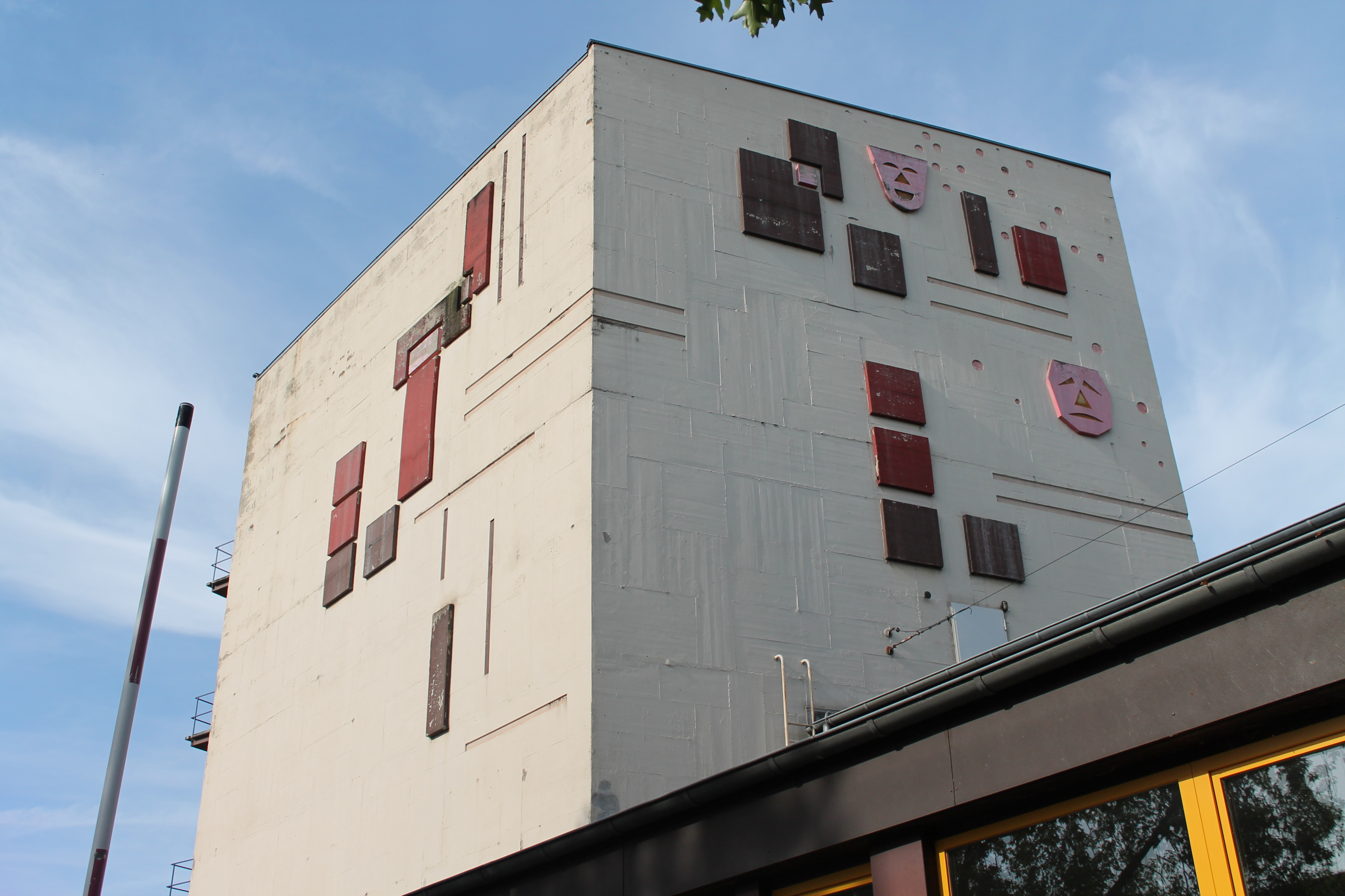 Herford, Baudenkmal 469, Turm